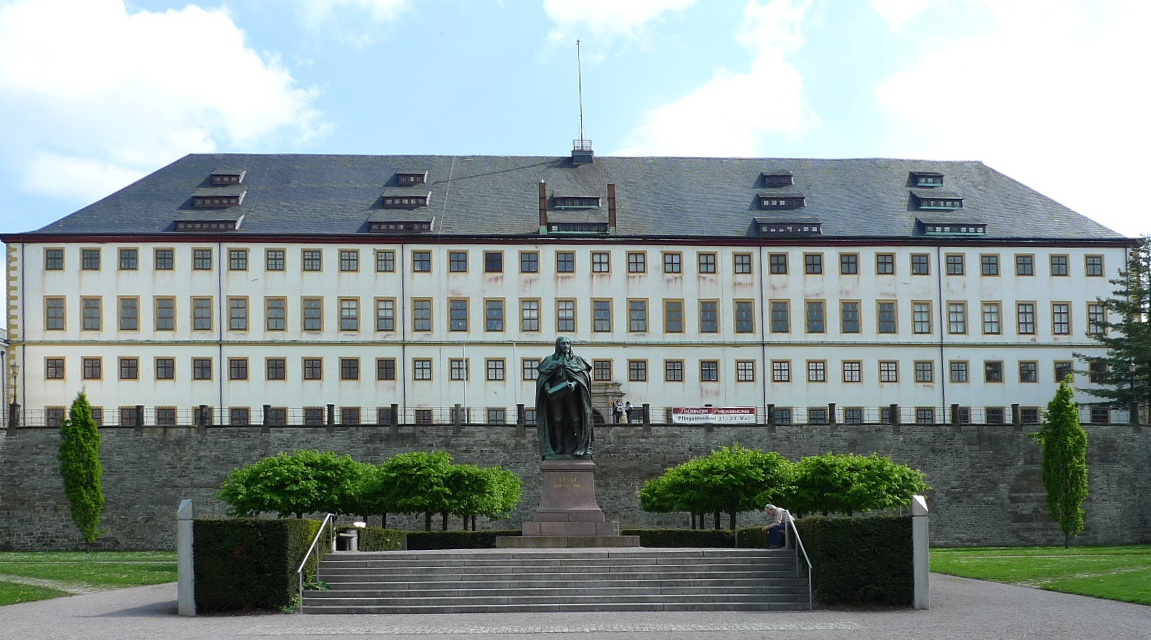 Gotha - Schloss Friedenstein - Ansicht von Norden (Stadtseite) mit dem Denkmal für Herzog Ernst den Frommen